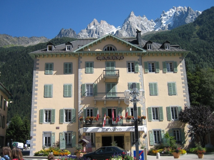 Le Casino de Chamonix en france dans le département de la Haute-Savoie.